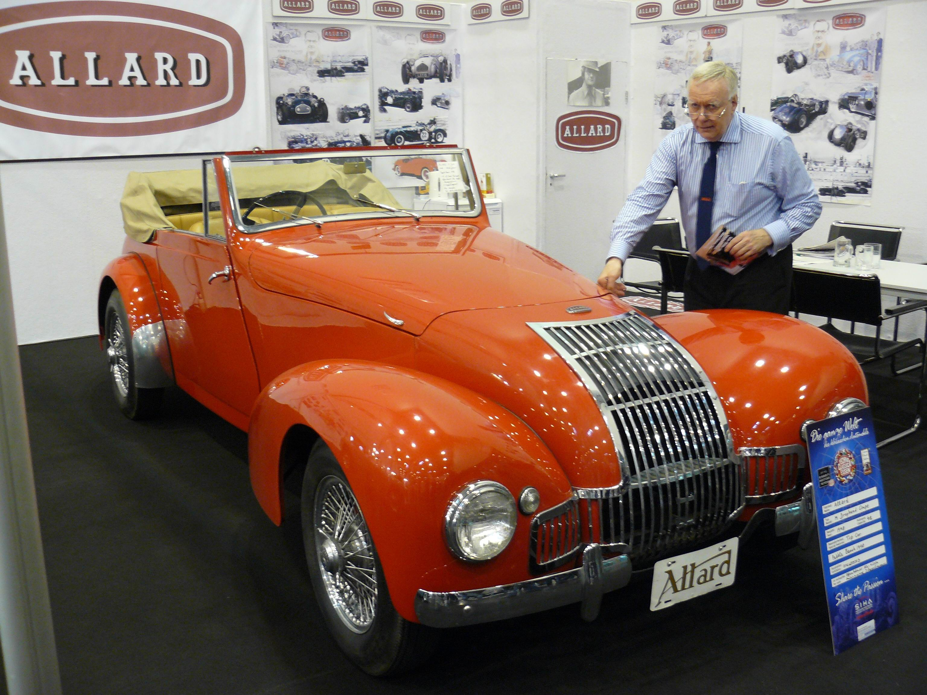 Essen 2011